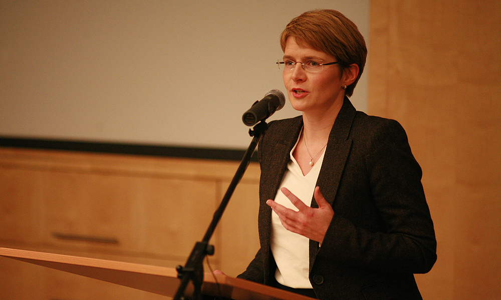 3. November 2011 - Der Kreisparteitag der LINKEN in der Hansestadt Rostock nominiert Kerstin Liebich als Oberbürgermeister-Kandidatin.